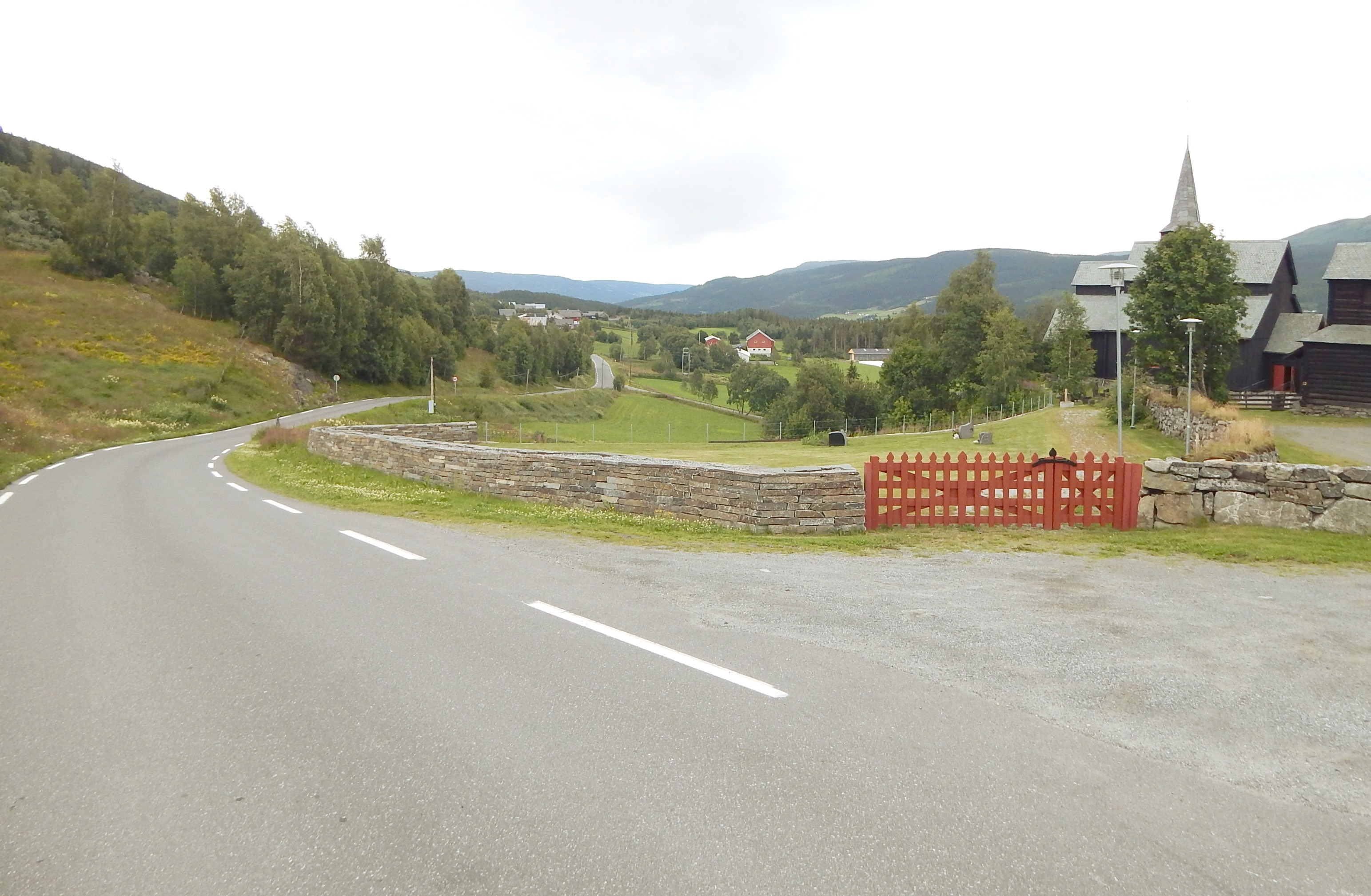 Fylkesvei 2510 (tidl. 293) forbi Høre stavkirke